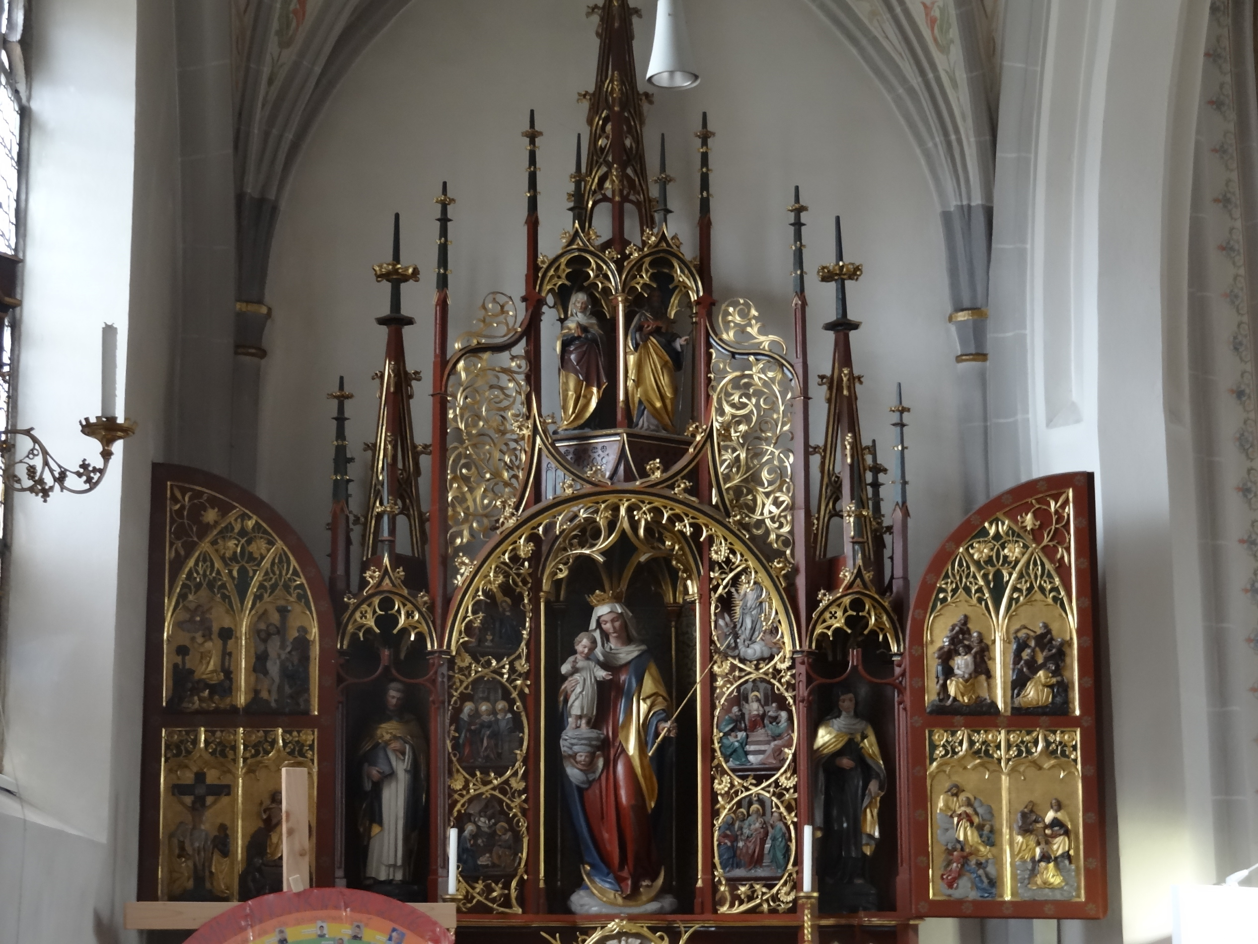 Marienaltar (linker Seitenaltar) der Pfarrkirche St. Peter in Velden an der Vils (Lkr. Landshut)